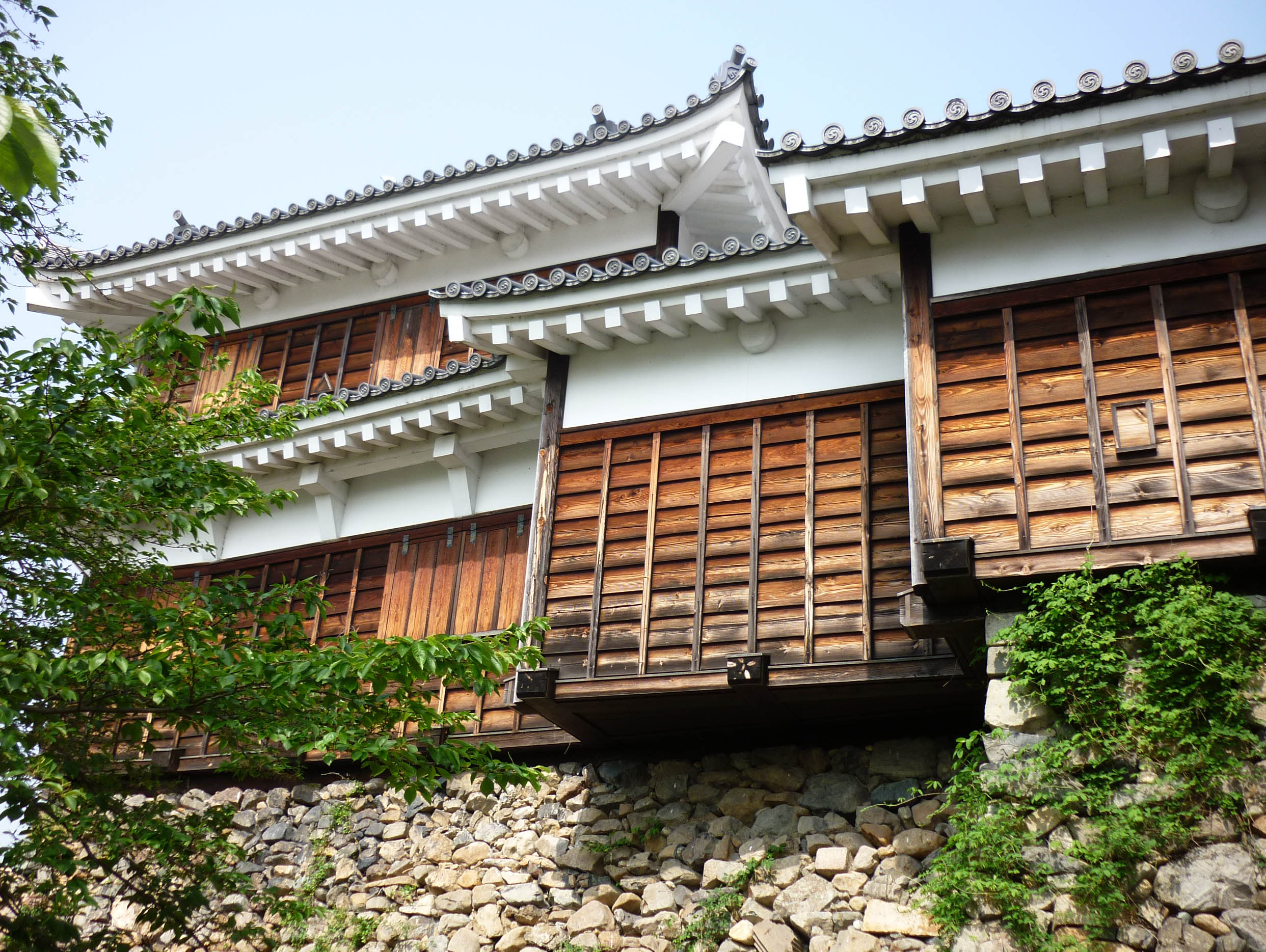 福知山城